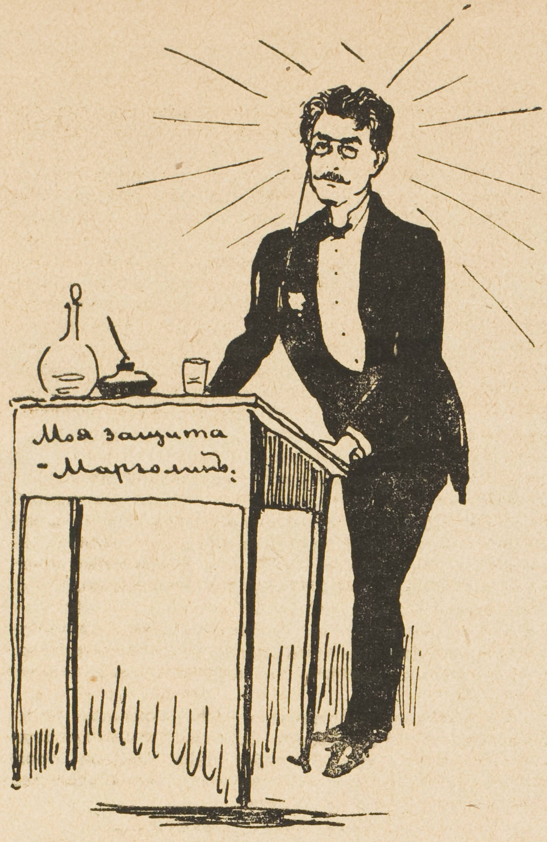 Сергей Павлович Марголин (1853 — 1906) — российский адвокат, присяжный поверенный. Иллюстрация из специального выпуска журнала "Пулёмёт". 3 декабря 1905.